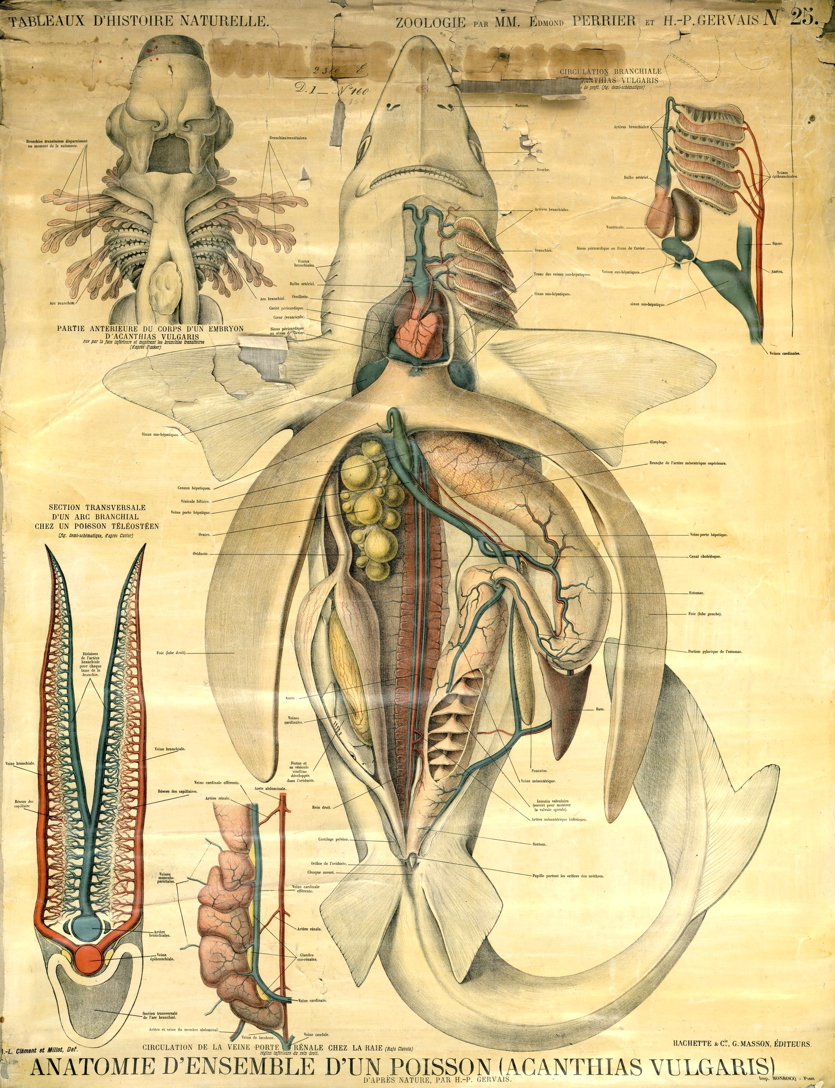 Anatomie d'ensemble d'un poisson (acanthias vulgaris). Bibliothèque Numérique de l'Université d'Artois. Retrieved on 26 March 2016.